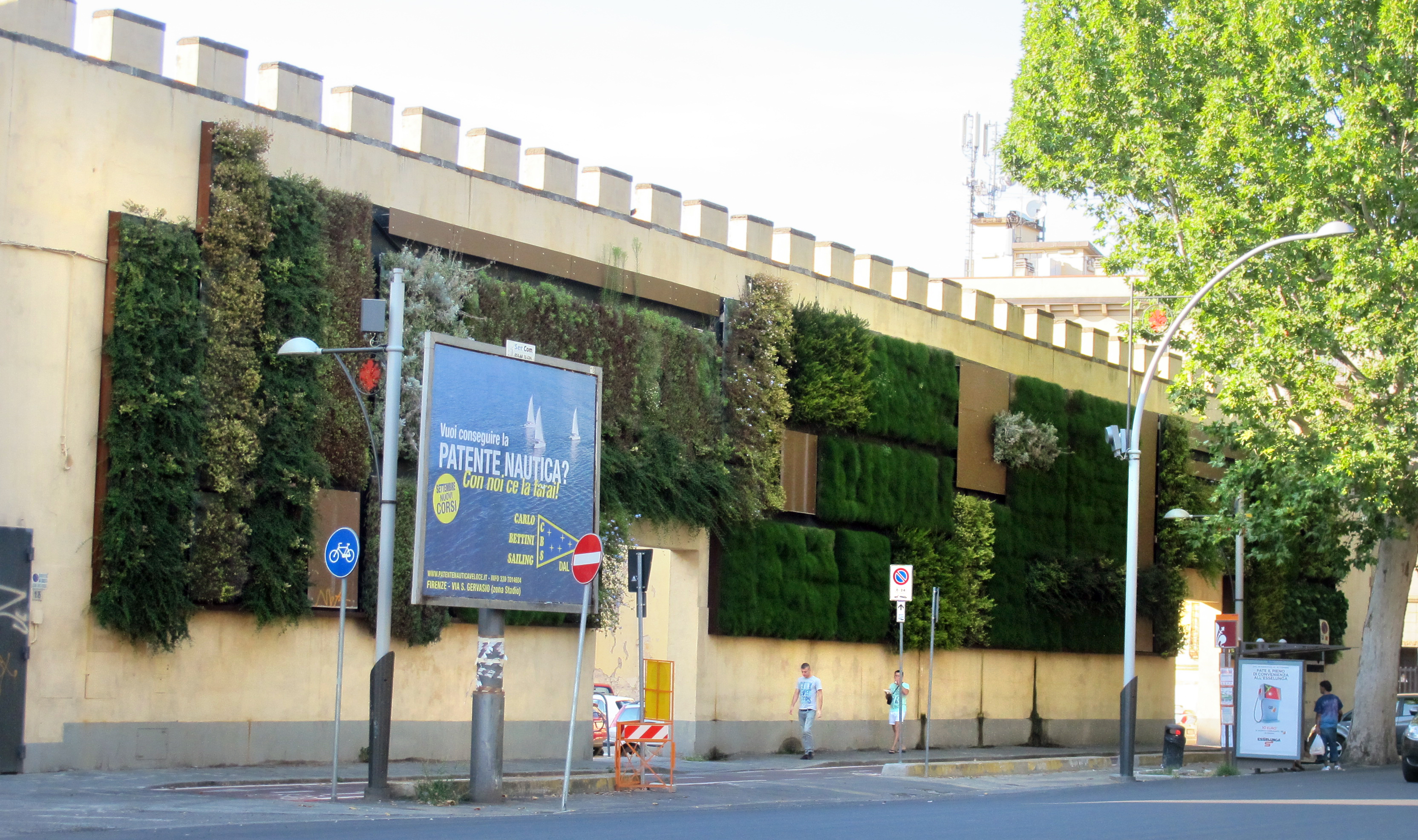 Firenze